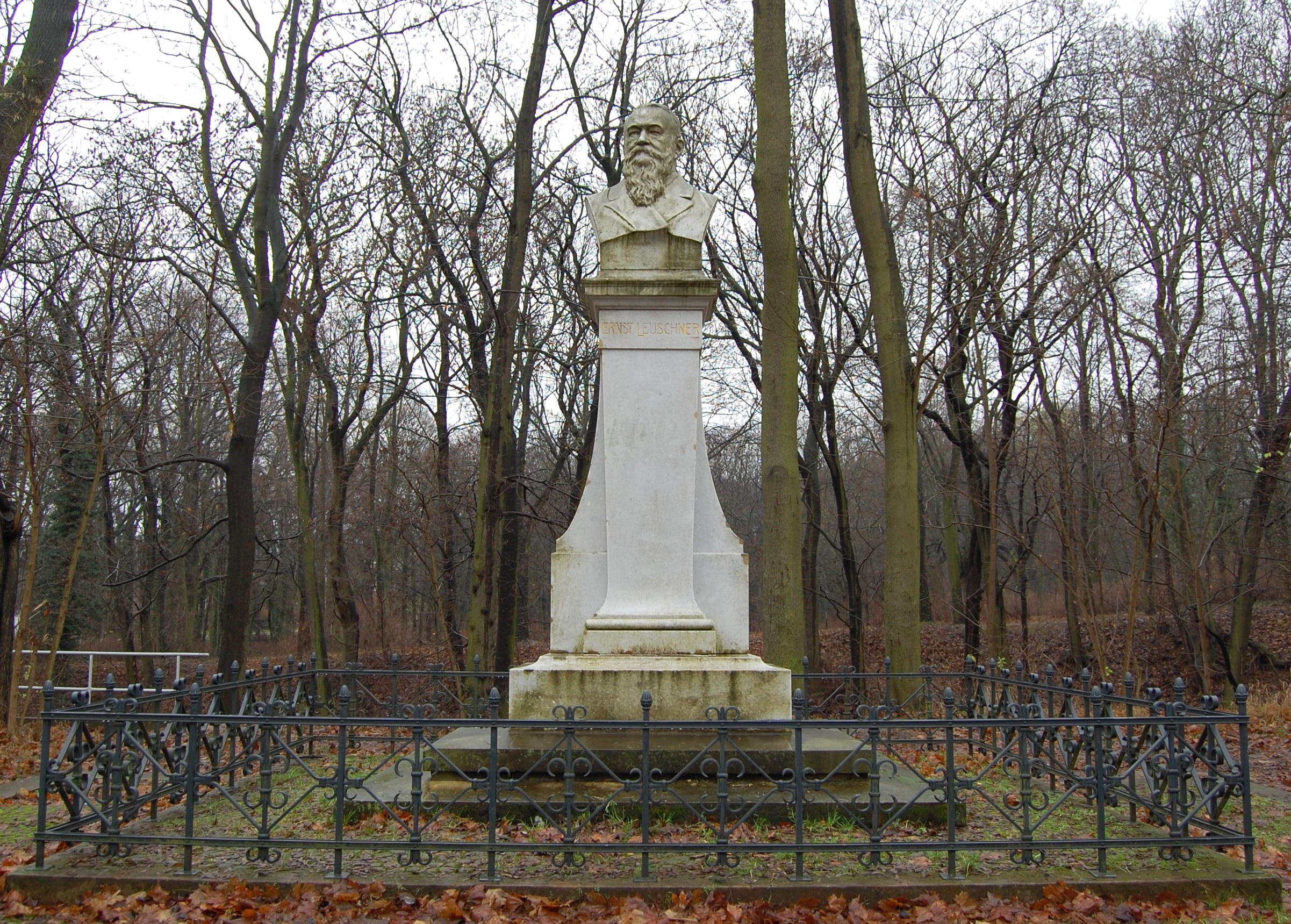 Denkmal für Ernst Leuschner in Lutherstadt Eisleben. Der Bildhauer war Carl Seffner.